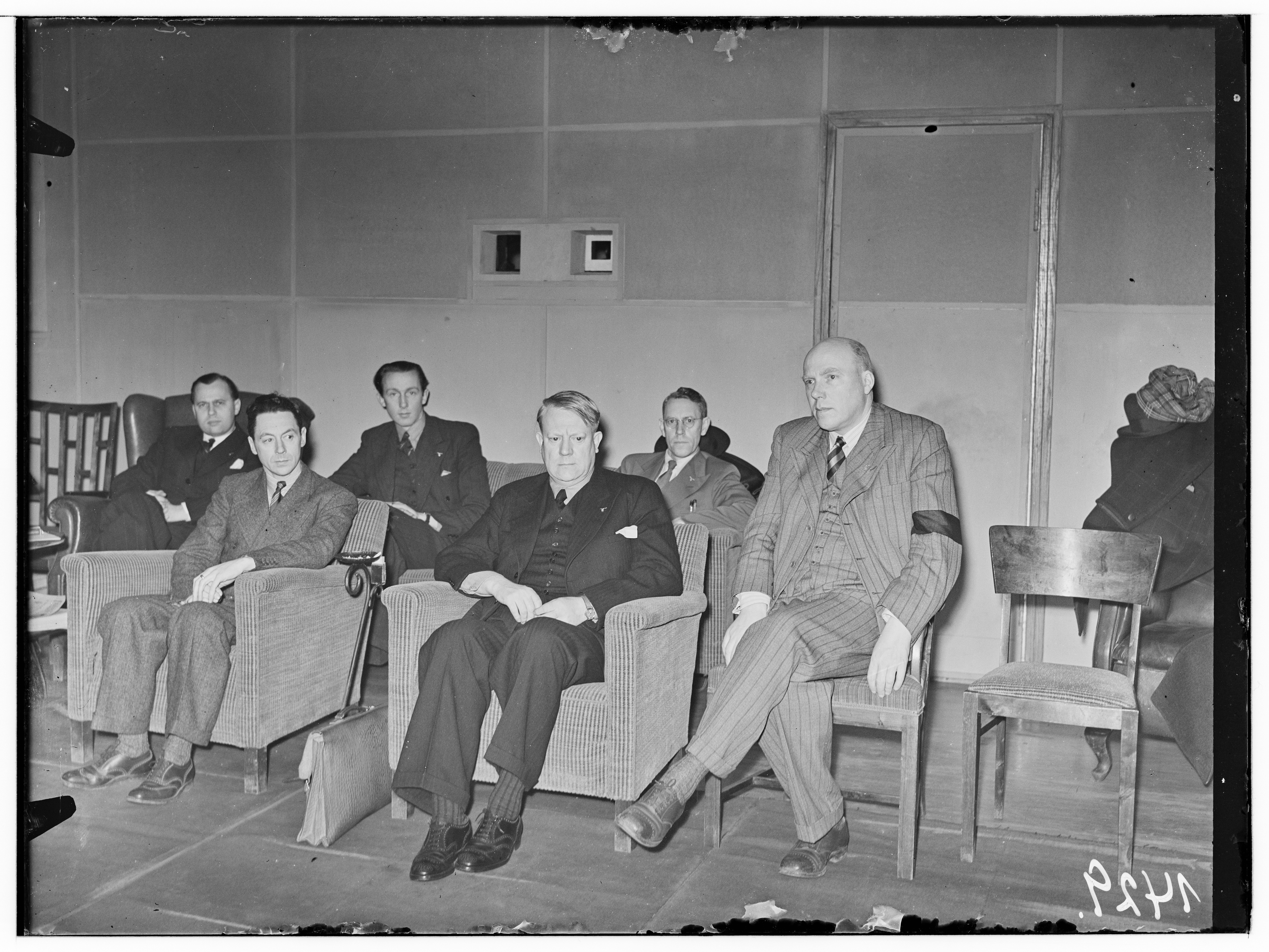 Vidkun Quisling på besøk i Filmdirektoratet. Quislings besøk i filmdirektoratet blir omtalt Aftenpostens morgenutgave lørdag 4. april 1942 under overskriften Ministerpresidenten ser på nye norske klturfilmer. Der er bildet gjengitt med følgende bildetekst: Førerens besøk i Statens Filmdirektorat. Fra venstre: Minister Fuglesang, minister Lunde, ekspedisjonssjef i Kultur- og Folkeopplysningsdepartementet Bjarne Holst, Føreren, pressedirektør Beggerud og direktør Sinding. (fot. NTB) Den korte reportasjen lyder slik: Ministerresidenten var onsdag innbudt av sjefen for Kultur- og Folkeopplysningsdepartementet, minister, dr. Gulbrand Lunde, til fremvisning av nye kulturfilmer fra Nord-Norge og Telemark. Det blev også vist fram noen ukerevyer. Foruten minister Lunde, var også minister Fuglesang, filmdirektør Sinding, pressedirektør Beggerud og ekspedisjonssjef Holst tilstede.